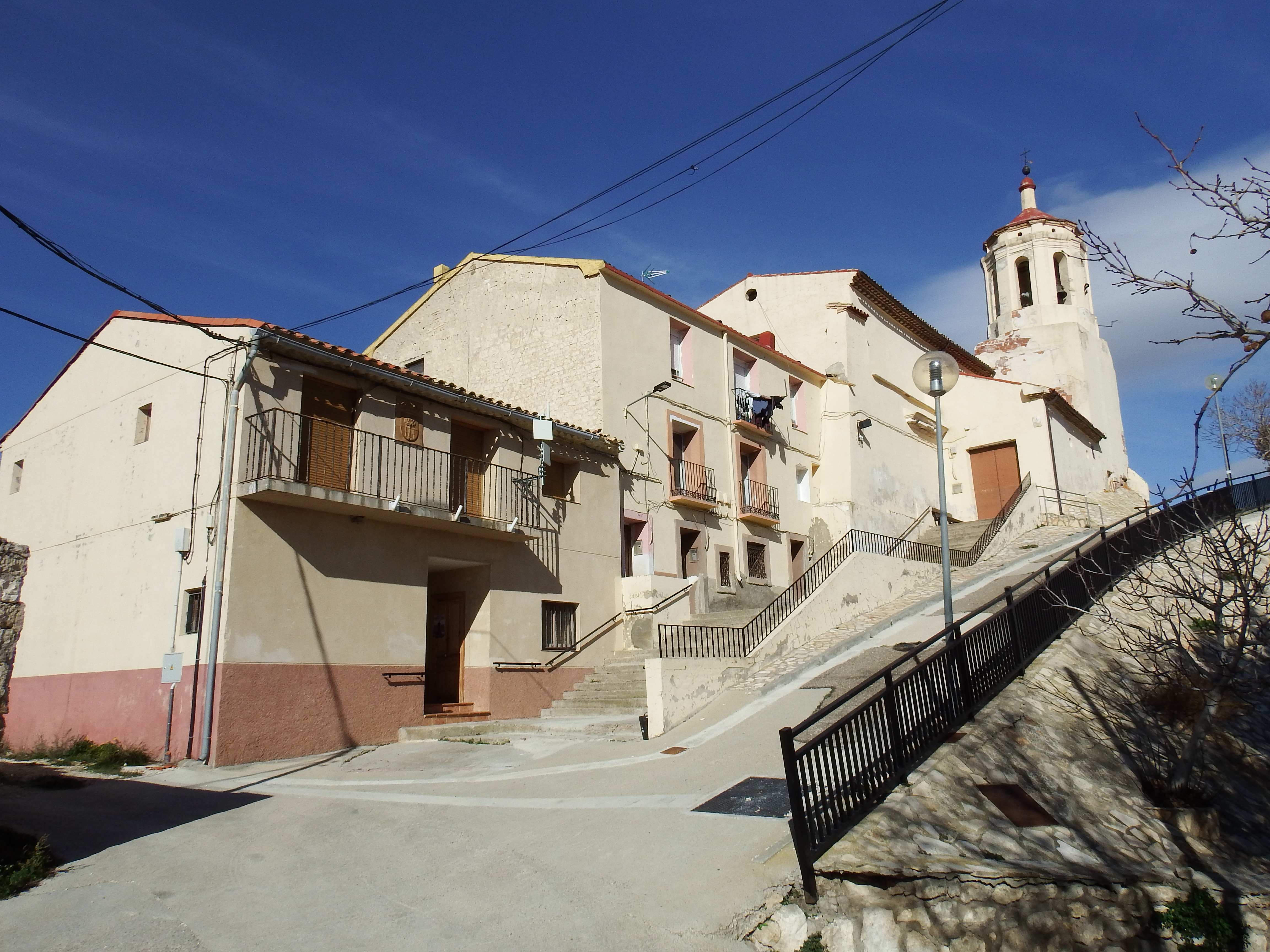 Valmadrid, Ayuntamiento